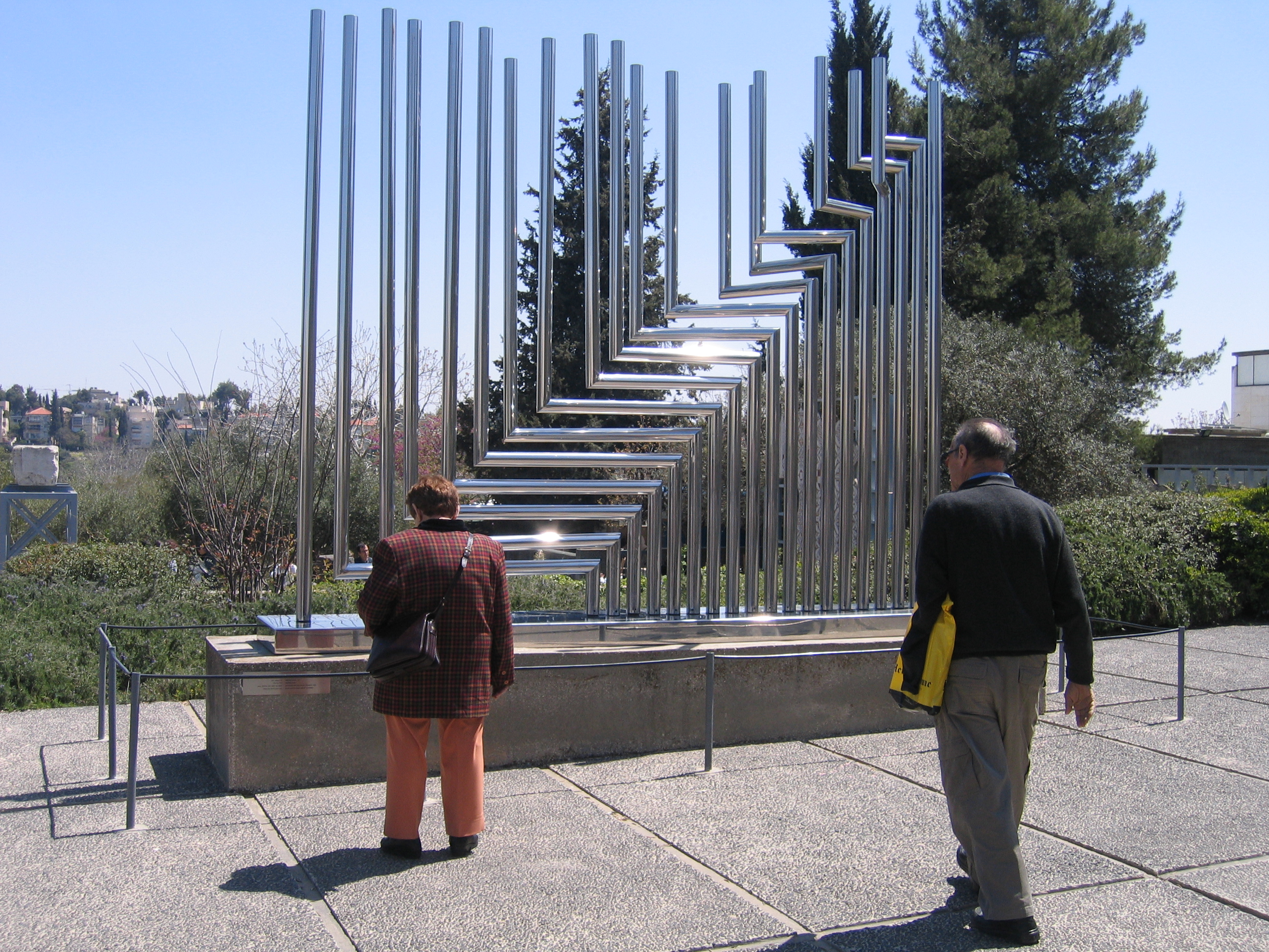 Sculpture